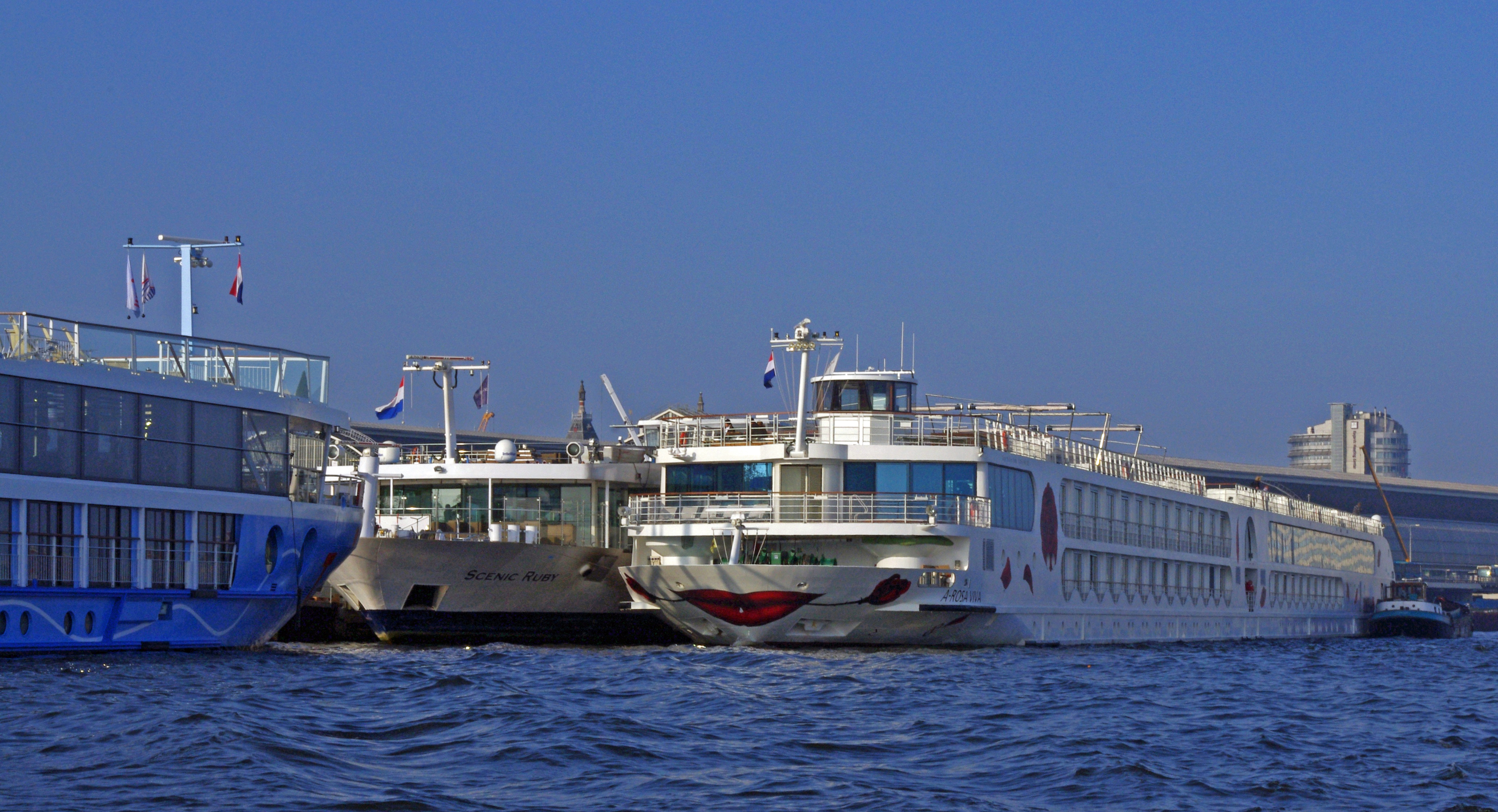 Die Flusskreuzfahrtschiffe A-Rosa Viva, Scenic Ruby und TUI Maxima in Amsterdam